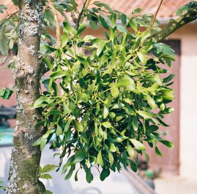 Jemioła.